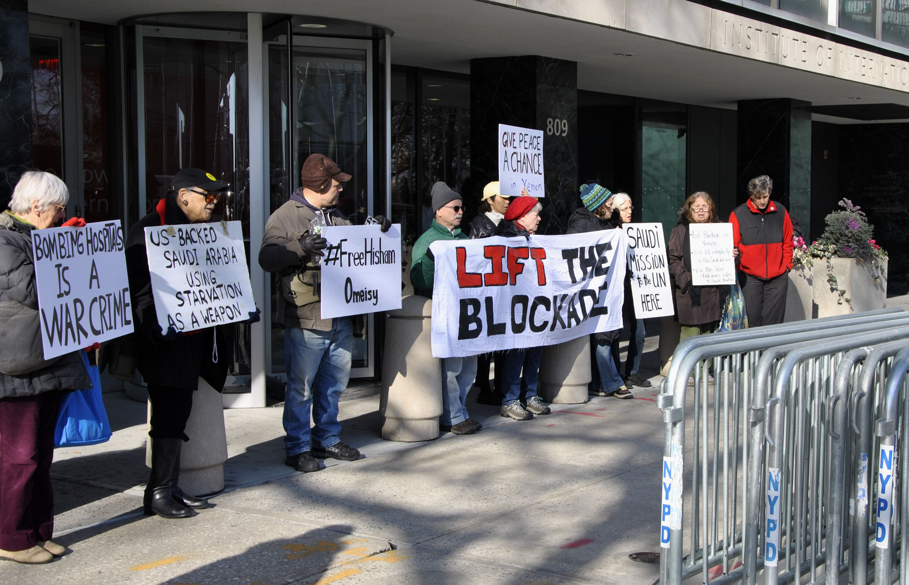 100 Blockades